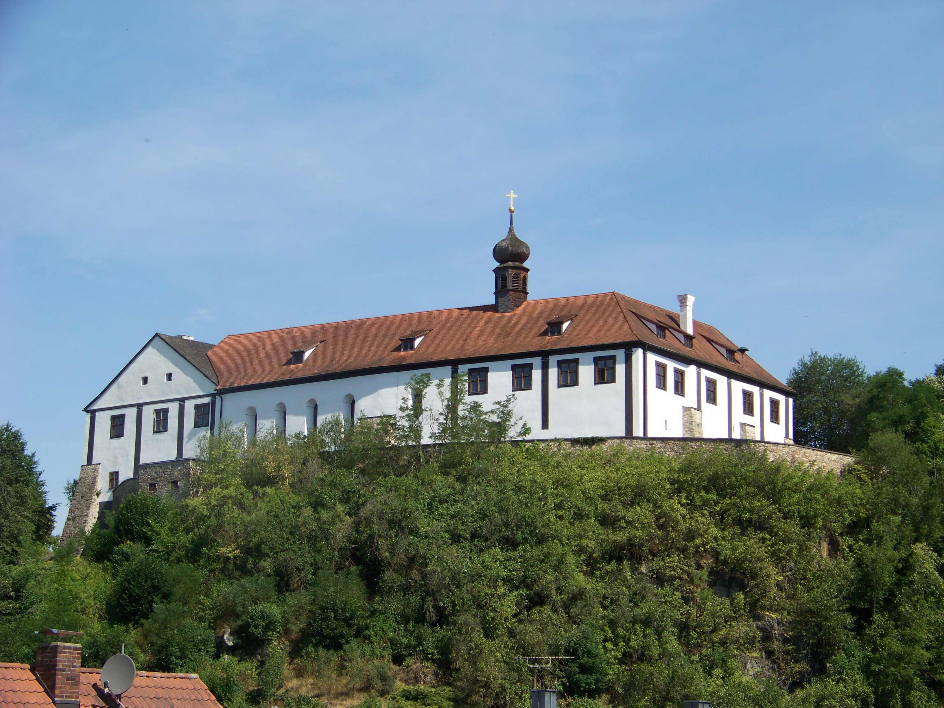 Altrandsberg, Schloßweg 1, Schloss, zweigeschossige Vierflügelanlage um trapezförmigen Innenhof mit gewölbter Tordurchfahrt und teilweise schindelgedecktem Walm- und Satteldächern, im 17. Jahrhundert unter Einbeziehung von Teilen der mittelalterlichen Wehrmauerabschnitte, des Bergfrieds und des Palas ausgebaut, Erneuerungen und Umbauten nach Bränden im 16./17. Jahrhundert, Westflügel 1950 weitgehend neugebaut, 1895- 1973 Nutzung als Gemeindekanzlei und Schule, im Südflügel ehem. Schlosskapelle St. Michael mit verschindeltem Zwiebeldachreiter, ursprünglich rippengewölbt, in der 1. Hälfte 18. Jahrhundert umgestaltet und in den 1930er Jahren als Filialkirche erweitert; mit Ausstattung; Reste der Befestigungsanlage, Bruchsteinmauerwerk, Granit; Schlosstor, Rundbogen mit Keilstein und Kämpfern, bez. 1853.